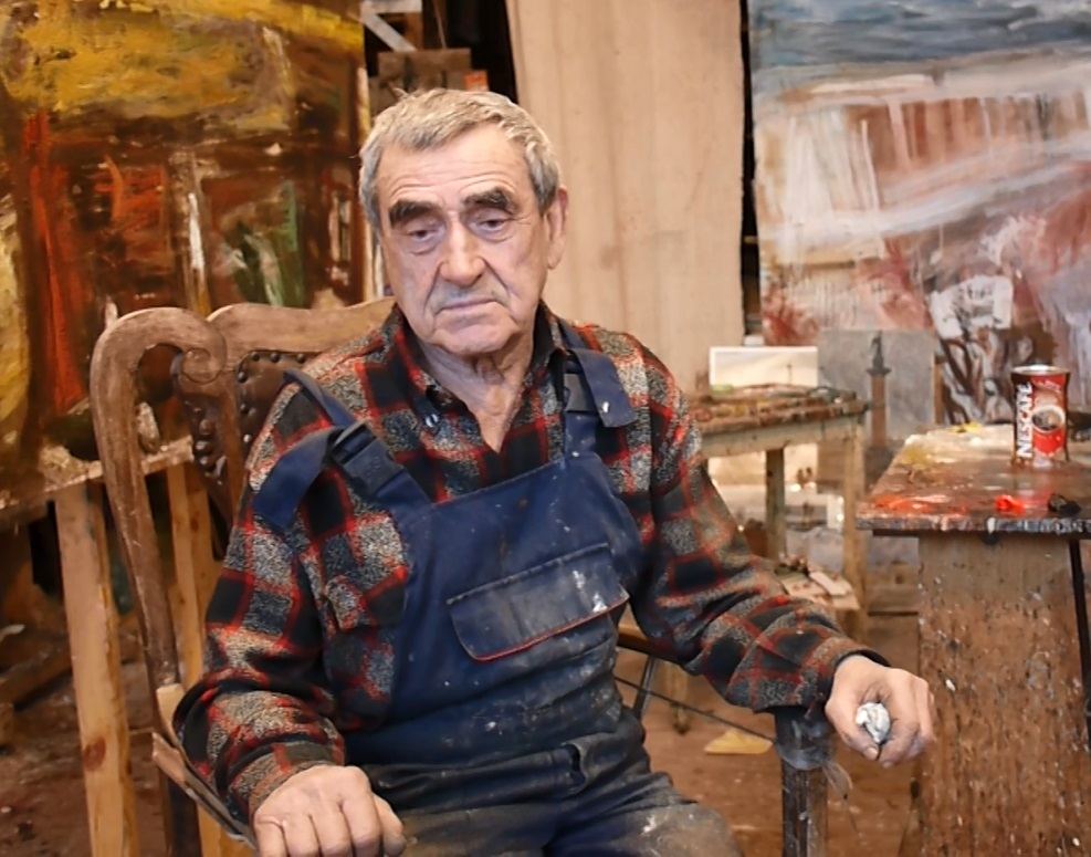 Фото Павла Федоровича Никонова.